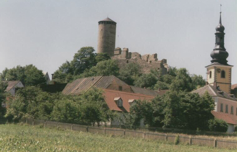 Ansicht von Thierstein mit Burgruine und Kirche